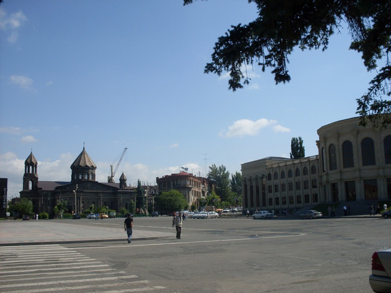 Центральная площадь города Гюмри в 2008 году.